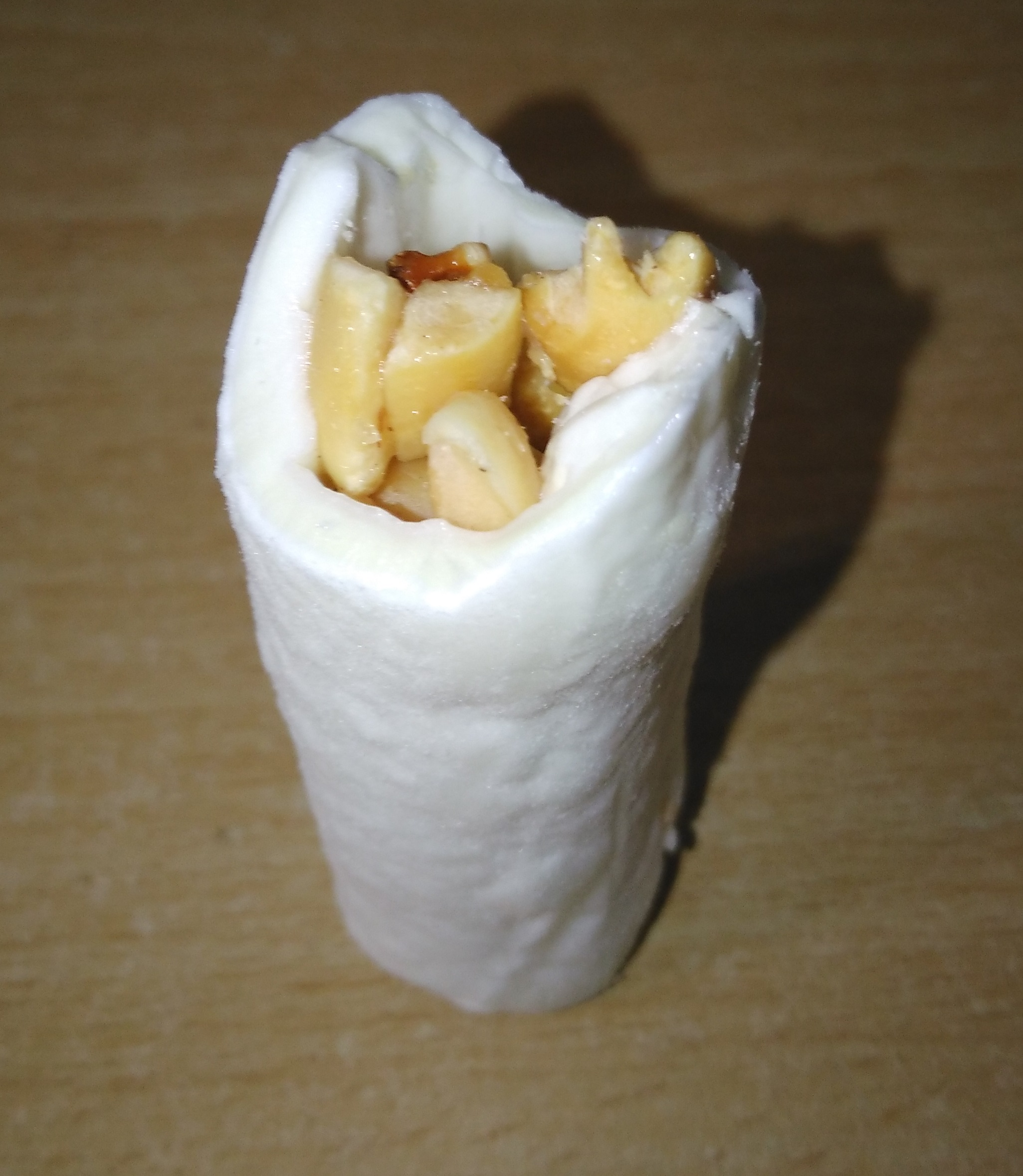 Kẹo kéo Việt Nam, tháng 8 năm 2018